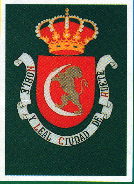 Fotografía escaneada de dominio público del escudo del Ayuntamiento de la Noble y Leal Ciudad de Huete (Cuenca)